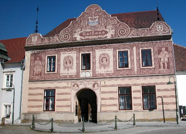 Rathaus von Drosendorf (Niederösterreich)